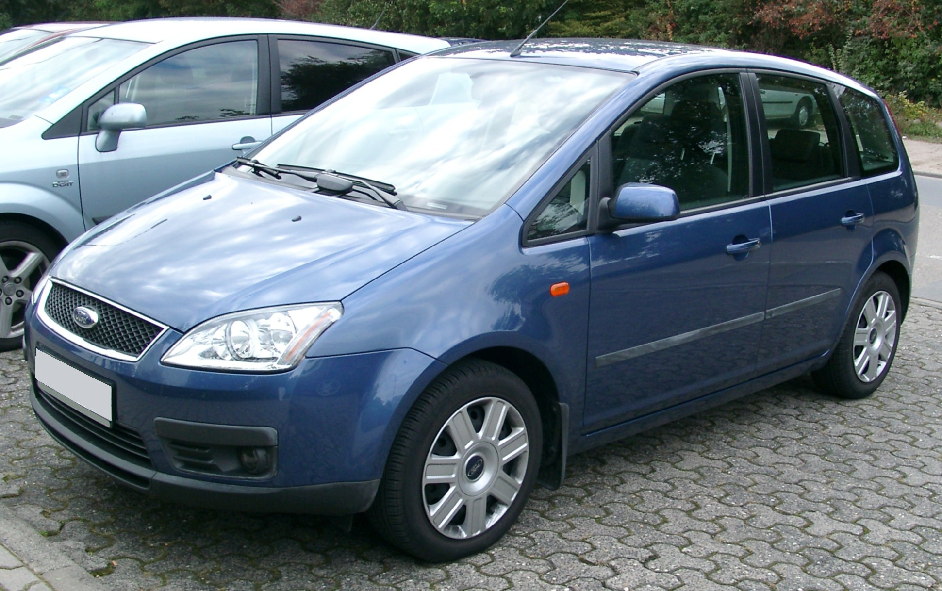 Ford C-MAX